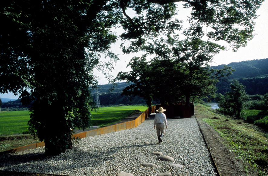 Casagrande & Rintala: Potemkin, Echigo-Tsumari Triennial, Japan, 2001